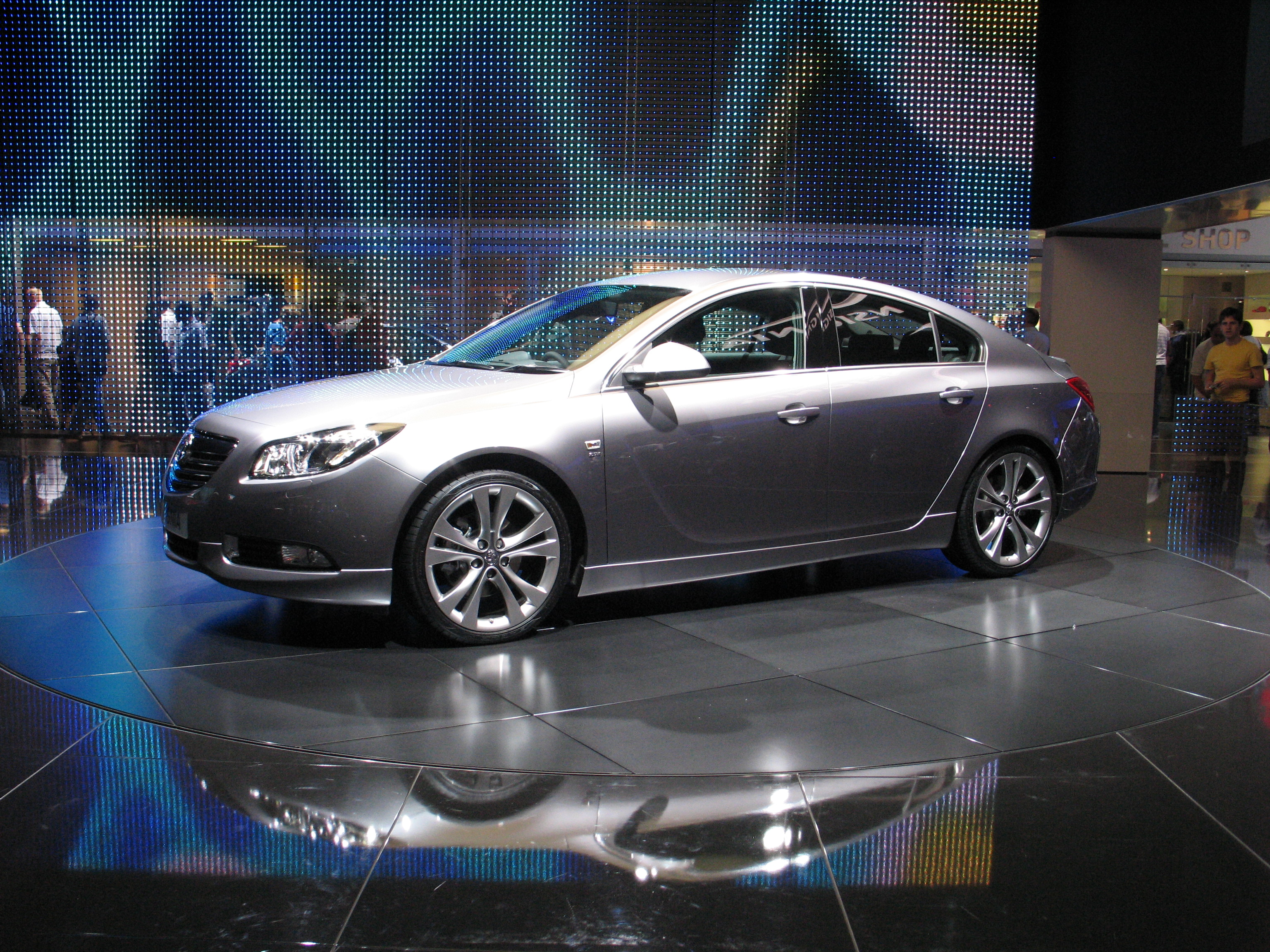 Opel/Vauxhall Insignia